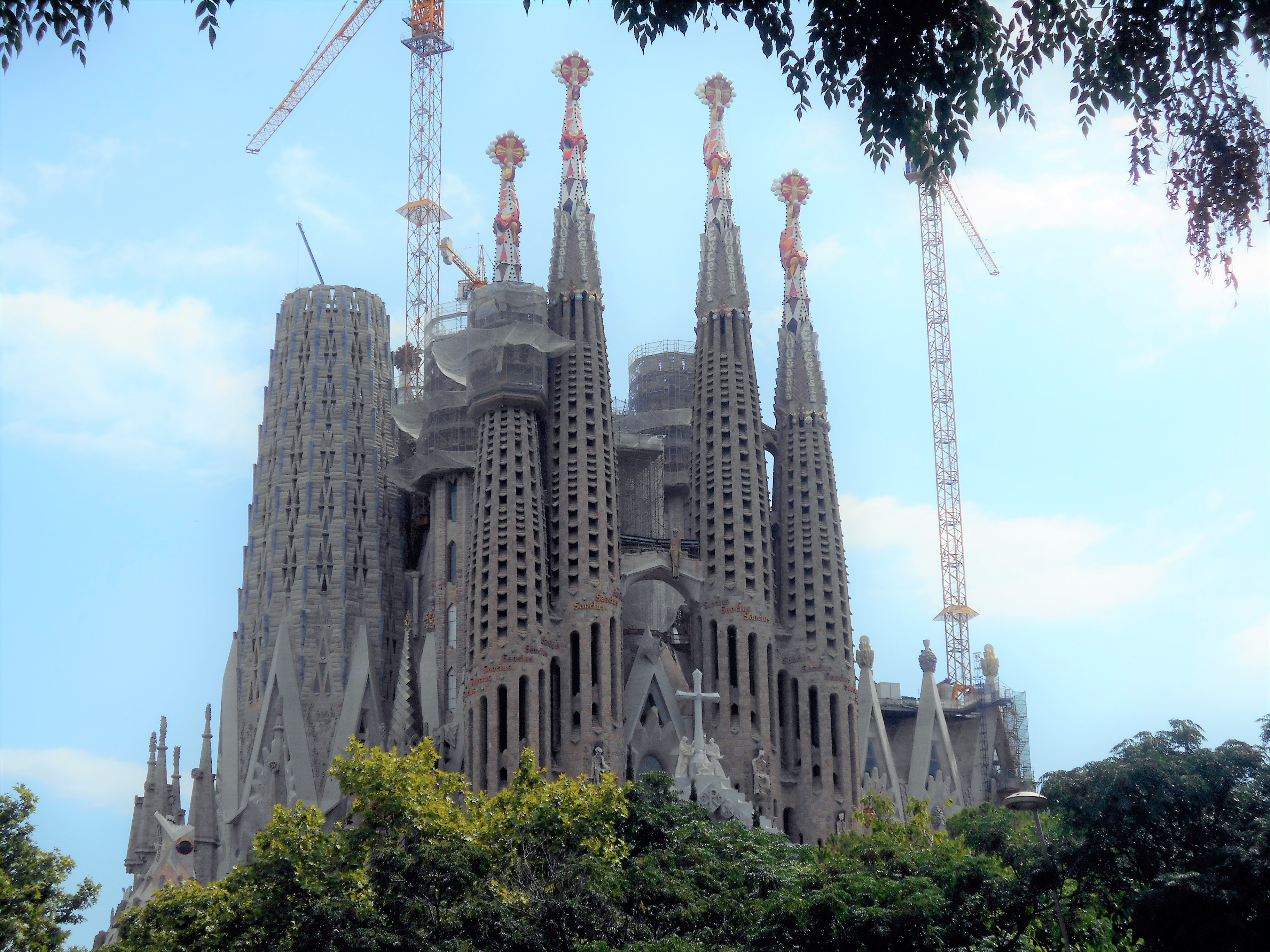 Exterior de la Sagrada Familia.